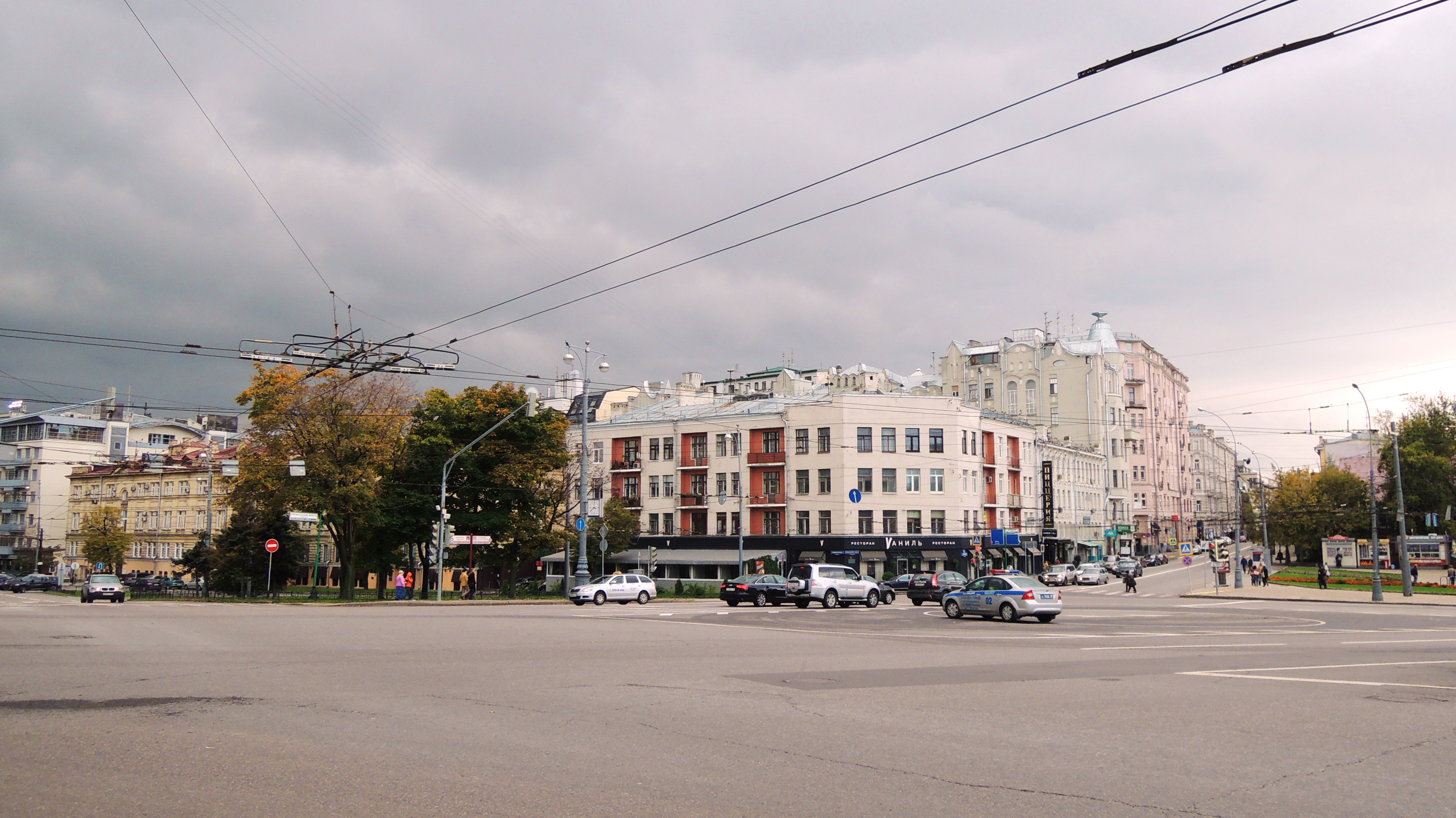 Prechistenskie Vorota Square